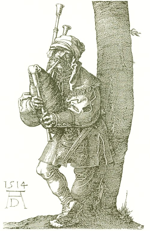 Flautista de Durero